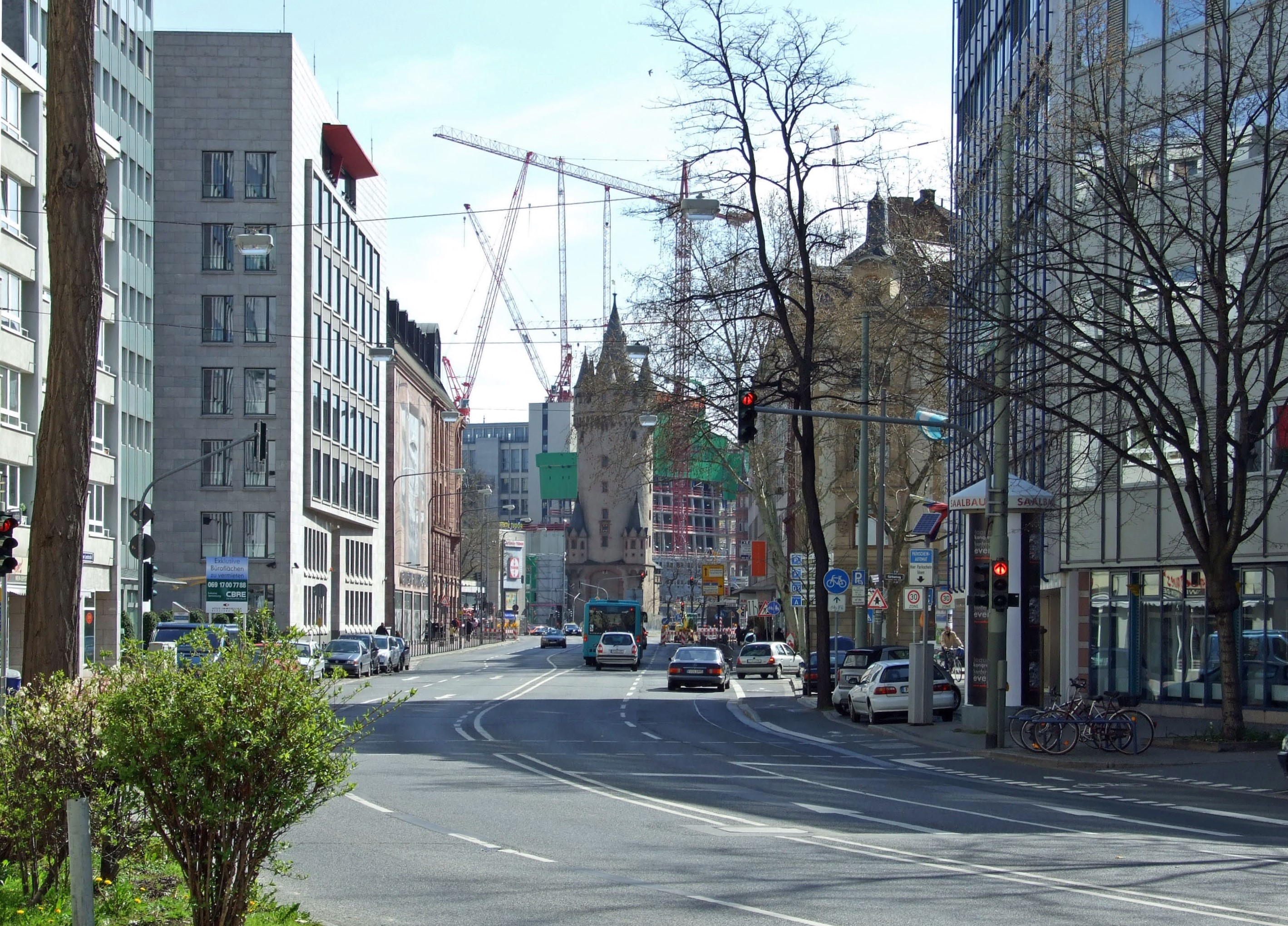 Anfangsstück der „Eschersheimer Landstrasse“ am „Eschenheimer Tor“ (Blick rueckwaerts)